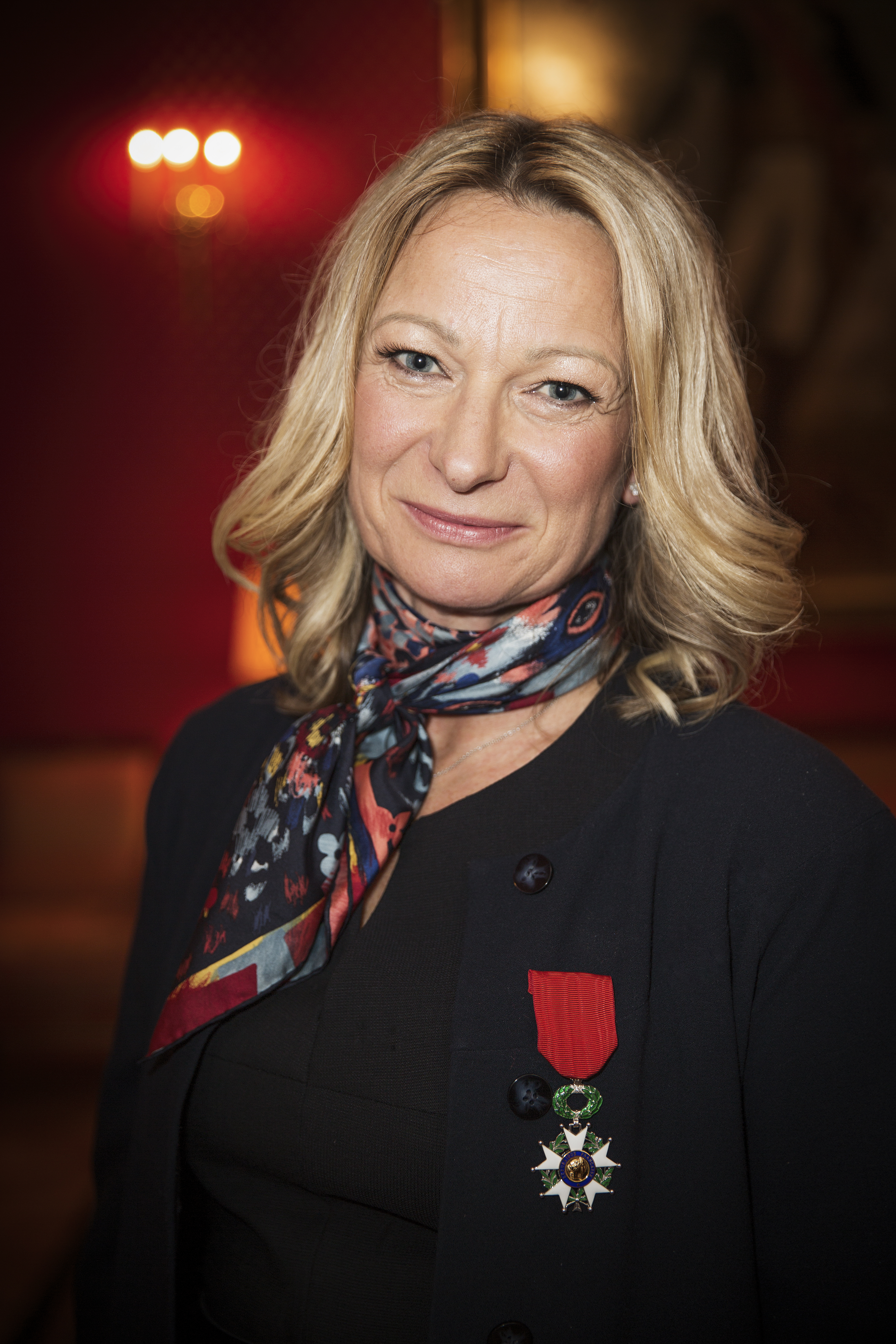 Foto av Annelie Johansson med franska medaljen för Legion d´Honneur som hon fick på den franska ambassaden i Stockholm 2015.